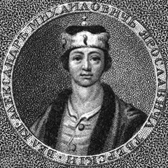 Вел. кн. Александр Михайлович Ярославич Тверский.